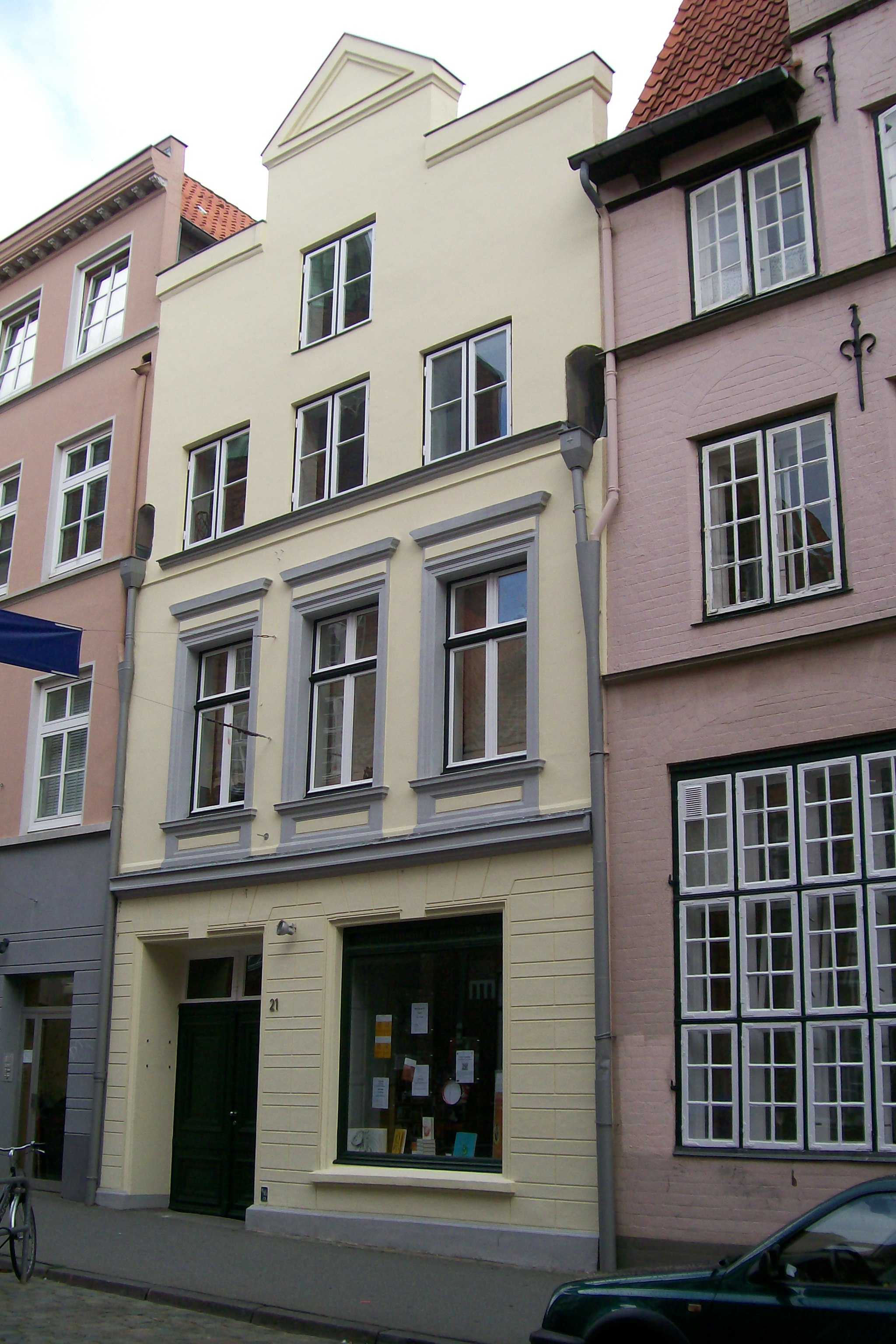 Günter-Grass-Haus in Lübeck, Glockengießerstraße 21, museum and gallery für German Nobelprizewinner Günter Grass